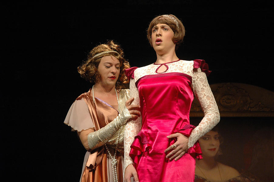 Српски (ћирилица): Сцене са премијере позоришне представе "Госпођа Министарка" у извођењу ансамбла позоришта Бошко Буха. На слици Горан Јевтић (лево) и Урош Јовчић (десно).